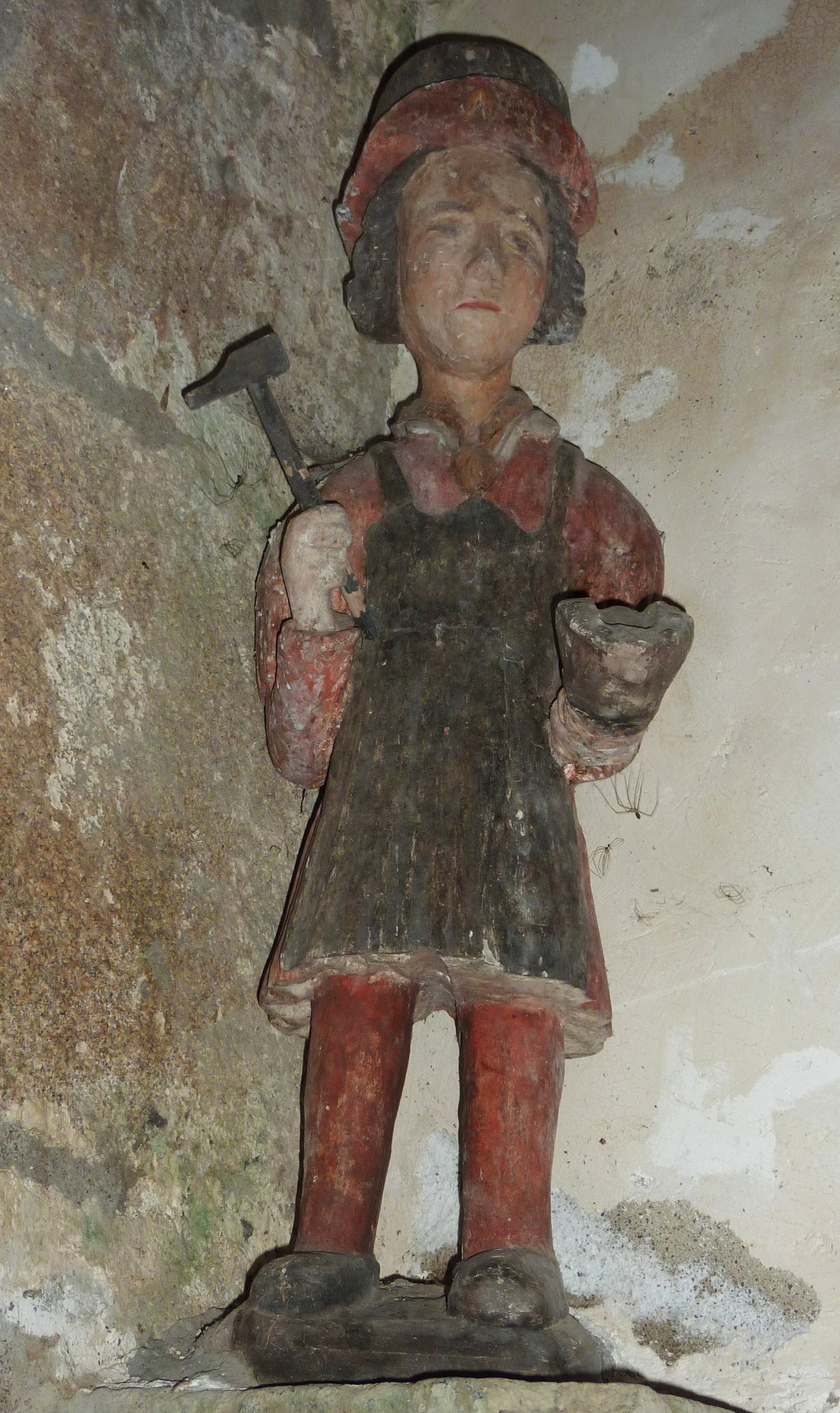 Plouha, chapelle de Kermaria-an-Iskuit, statue de Saint Eloy